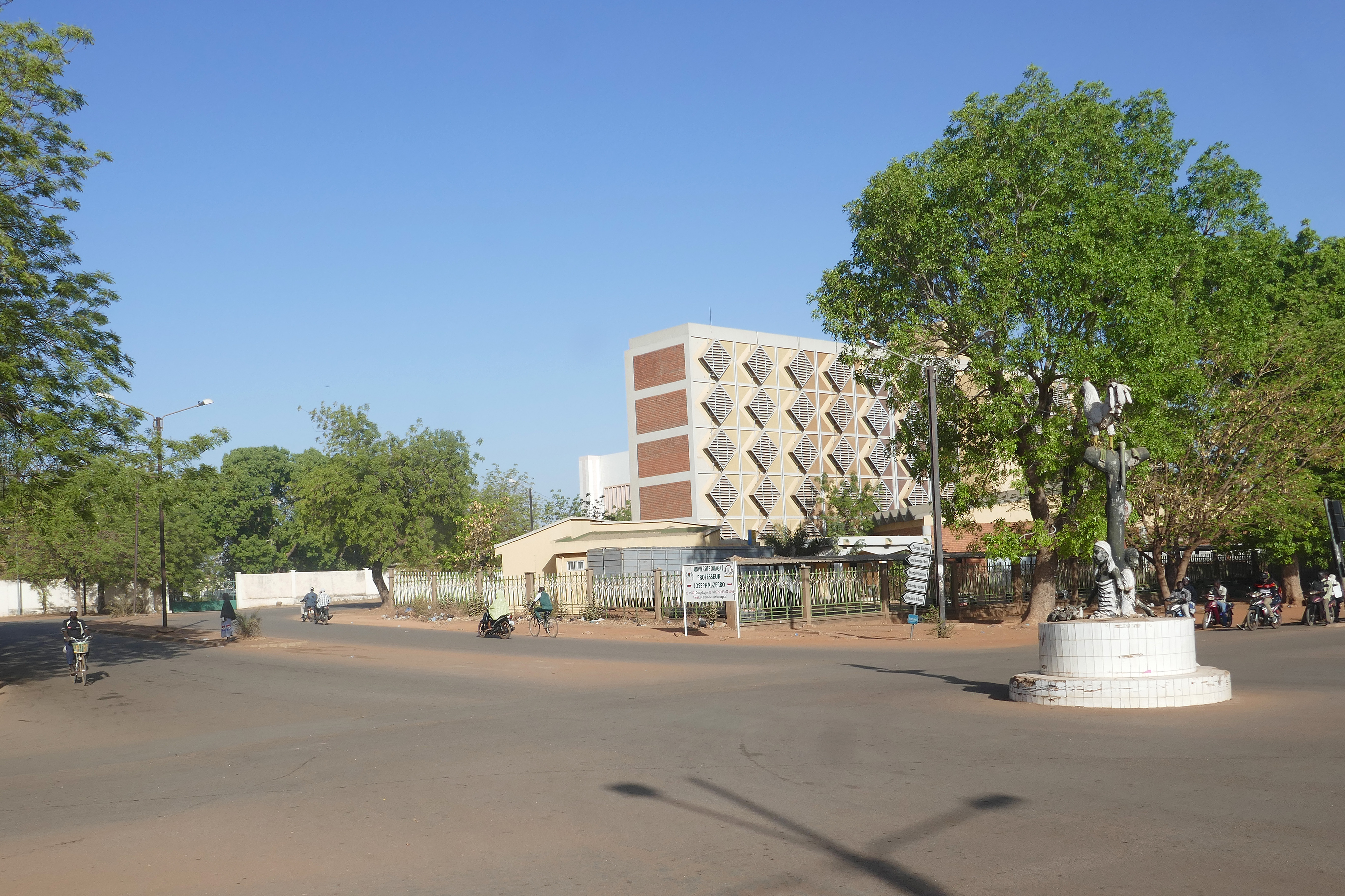 Bâtiment de l'Université Ouaga 1 Professeur Joseph Ki-Zerbo et monument (Burkina Faso).